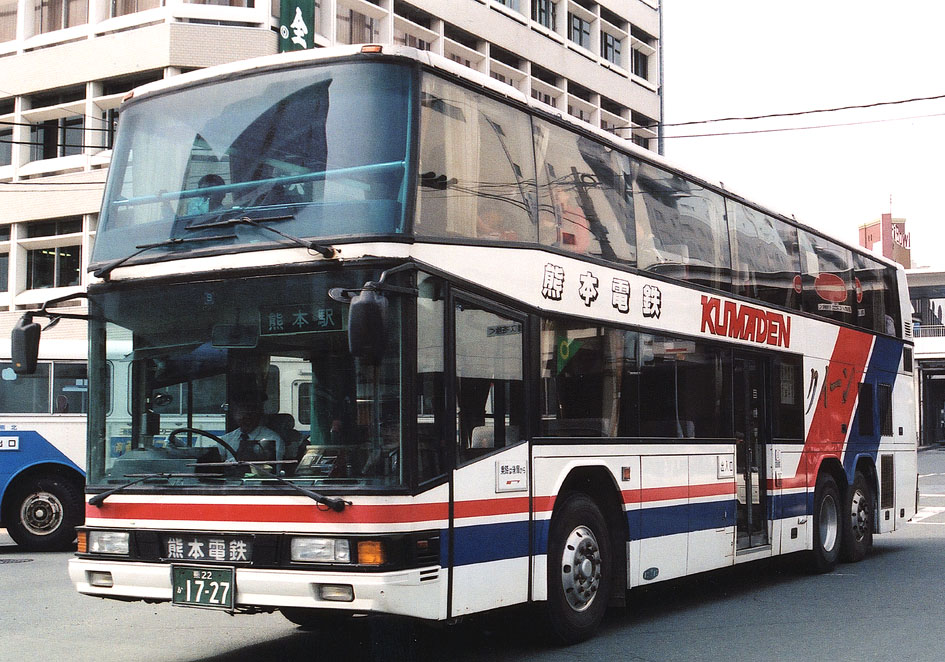 熊本電鉄 スペースドリーム P-GA66T